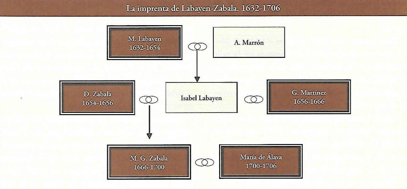 Martín de Labayen y los sucesores de su imprenta de Pamplona 1637-1706